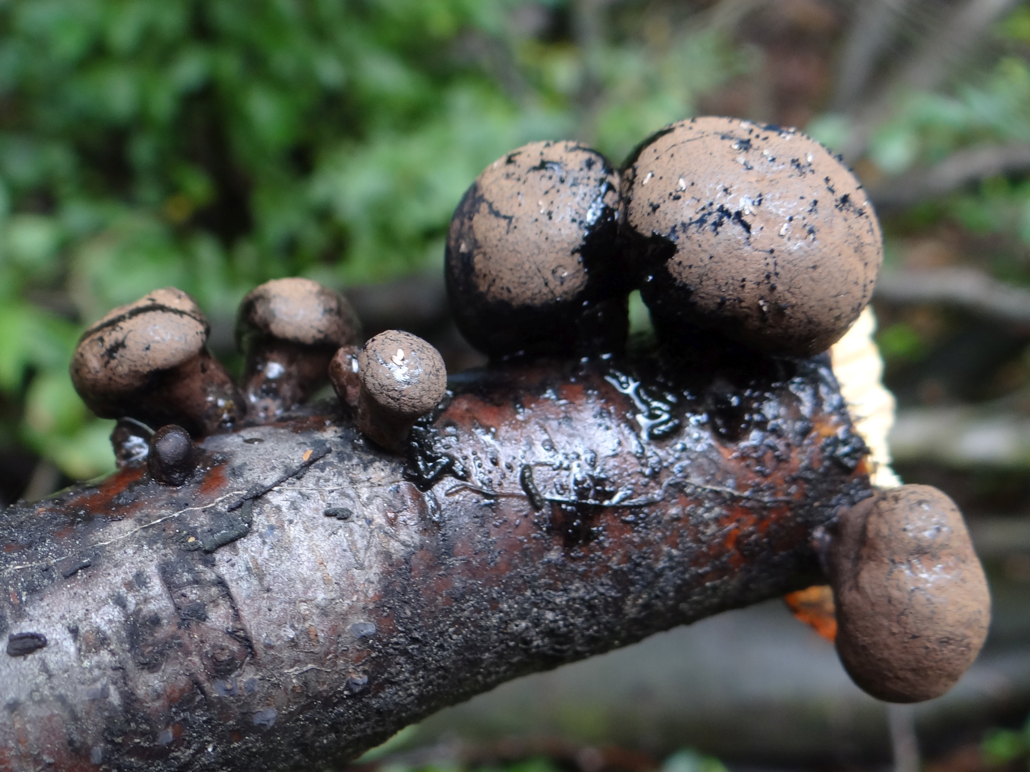 Daldinia decipiens on Betula verrucosa . Location: Poland, Pogórze Wiśnickie, Rajbrot